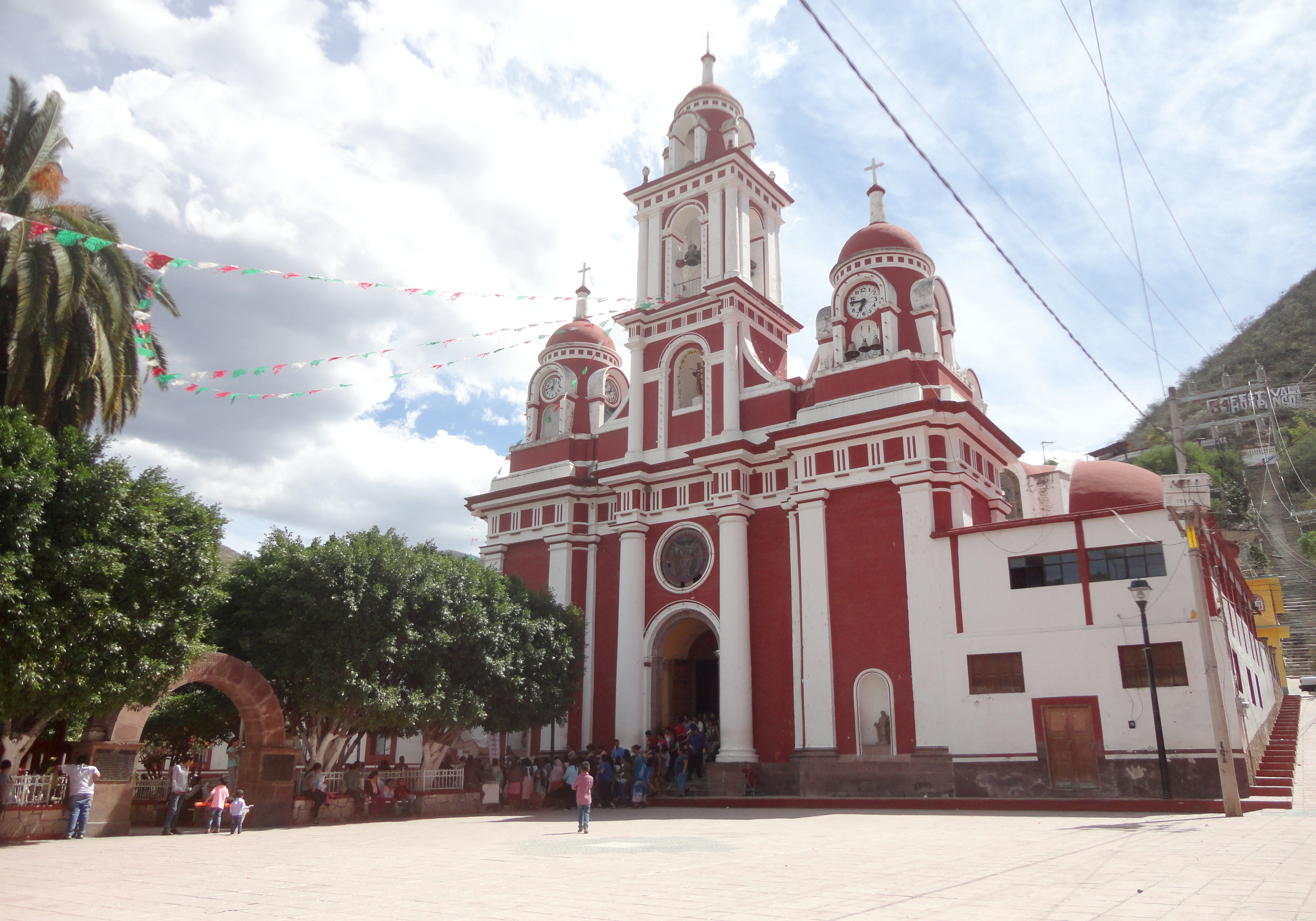 Parroquia de San Francisco de Asís en el centro de Xichú, Guanajuato, México.